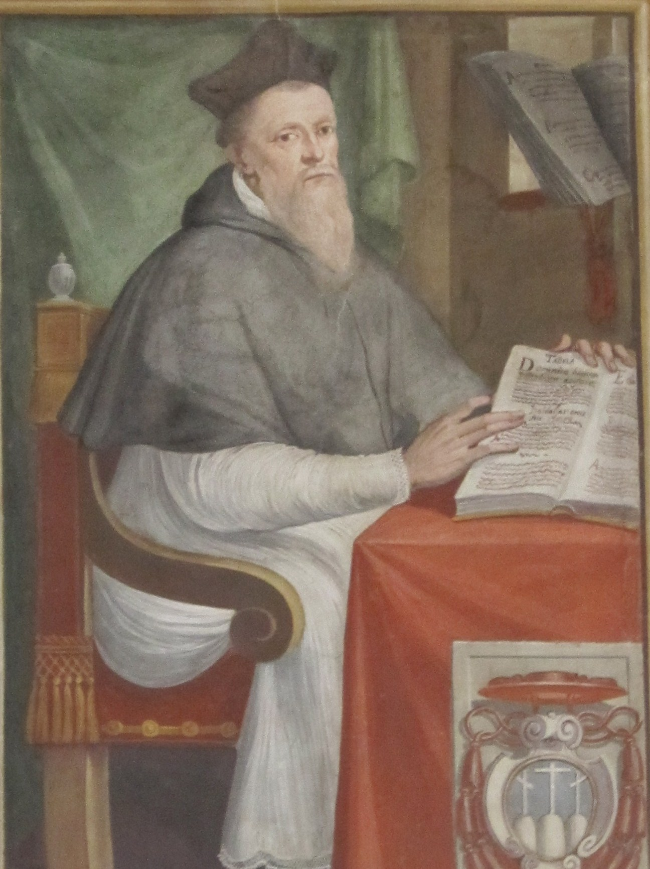 Egidio da Viterbo (1469-1532), affresco sec. XVII, part.